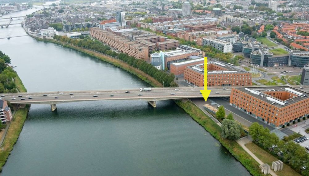 Luchtfoto van de Maas, John F. Kennedybrug en Céramique in Maastricht. De gele pijl is de locatie waar architect Ab König een de Céramique-toren wil realiseren, een gedeeltelijke reconstructie van de in 1992 gesloopte schoorsteen-watertoren van de Société Céramique. Limburgs: De John F. Kennedybrögk in Mestreech.